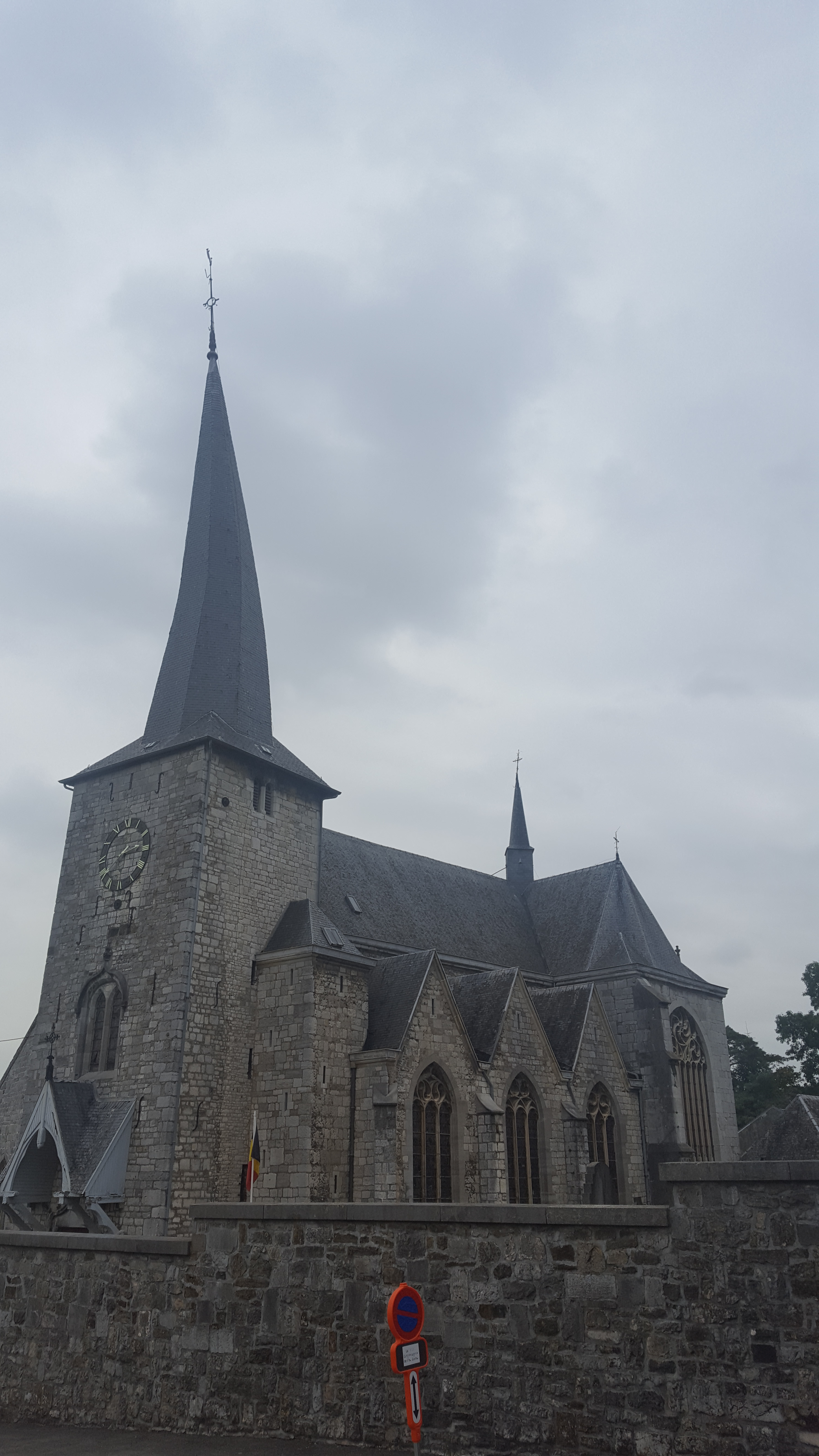 Église Saint-Lambert, Goé, Limbourg, Belgique